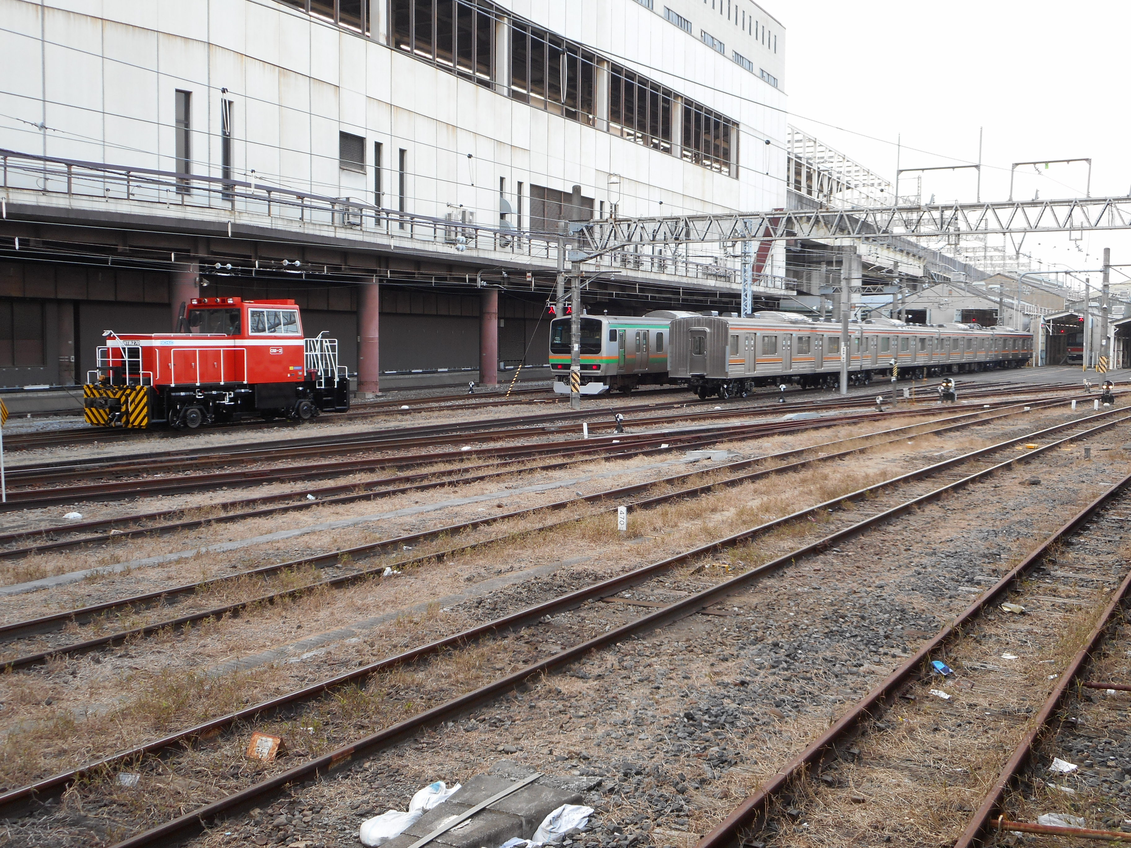 大宮総合車両センター南端で入換作業中の大宮総合車両センター専用入換動力車「OM-2」と、E231系1000番台小山車両センター所属U516編成、205系5000番台京葉車両センター所属M25編成の4両－大宮駅11番線ホームから撮影